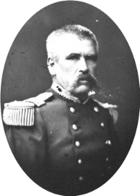 Comandante del 3° de Línea durante la Guerra del Pacífico durante la Campaña de Lima y de la Sierra.